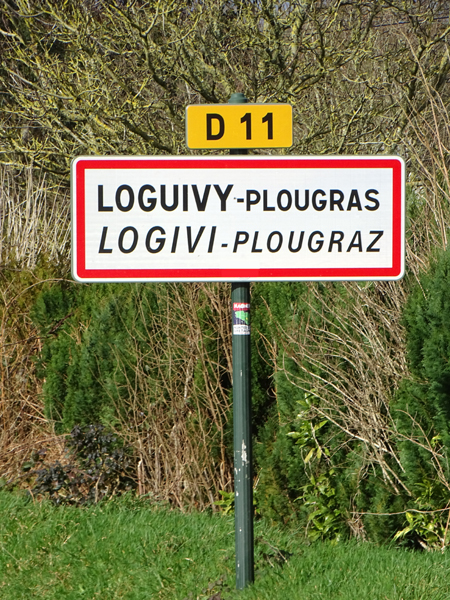 Logivi-Plougraz. Pannell hent